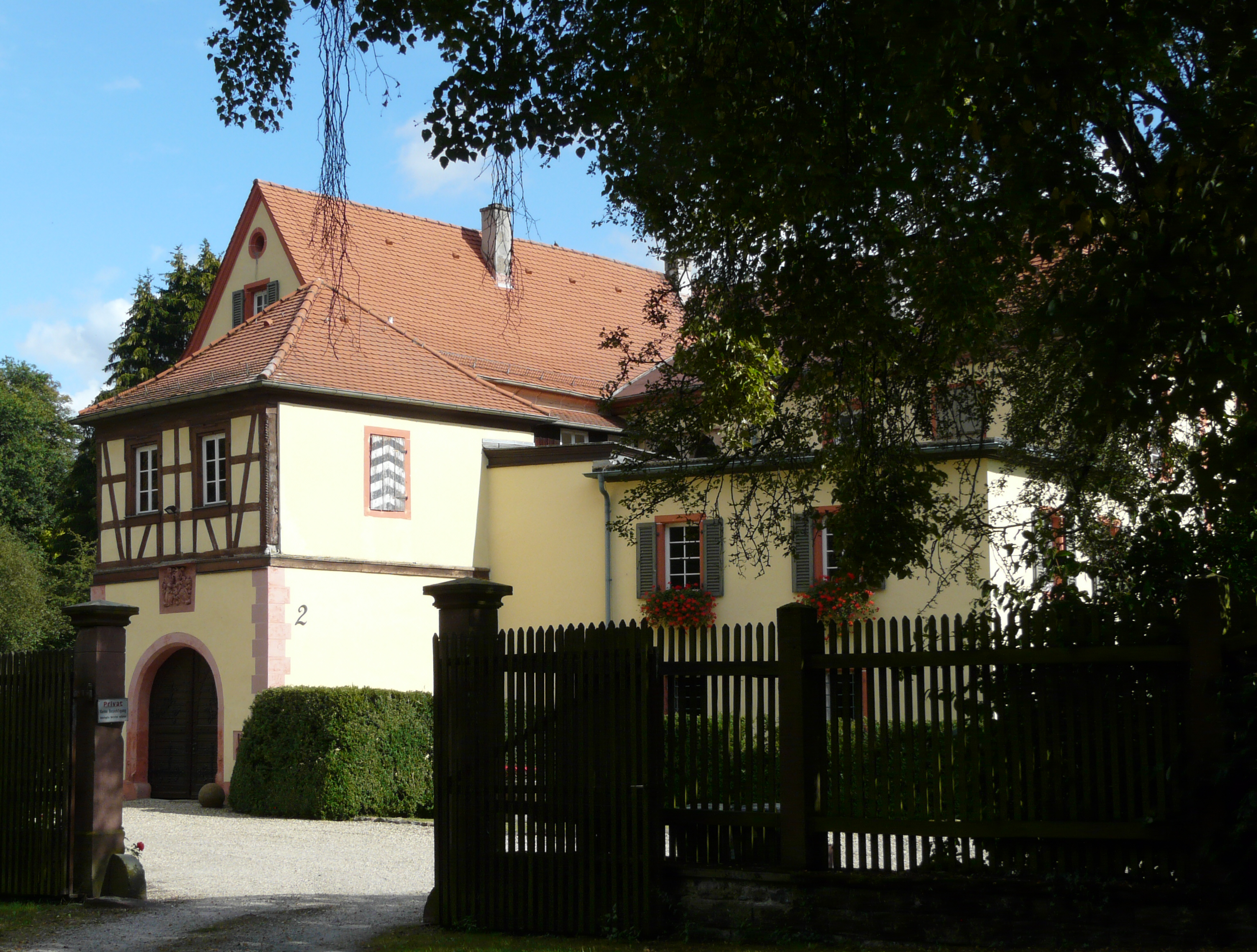 Wasserschloss Schatthausen, Eingangsbereich